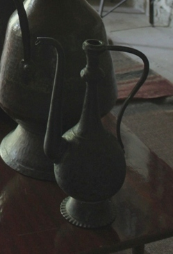 Село Лагич, Исмаиллинского района Азербайджана.